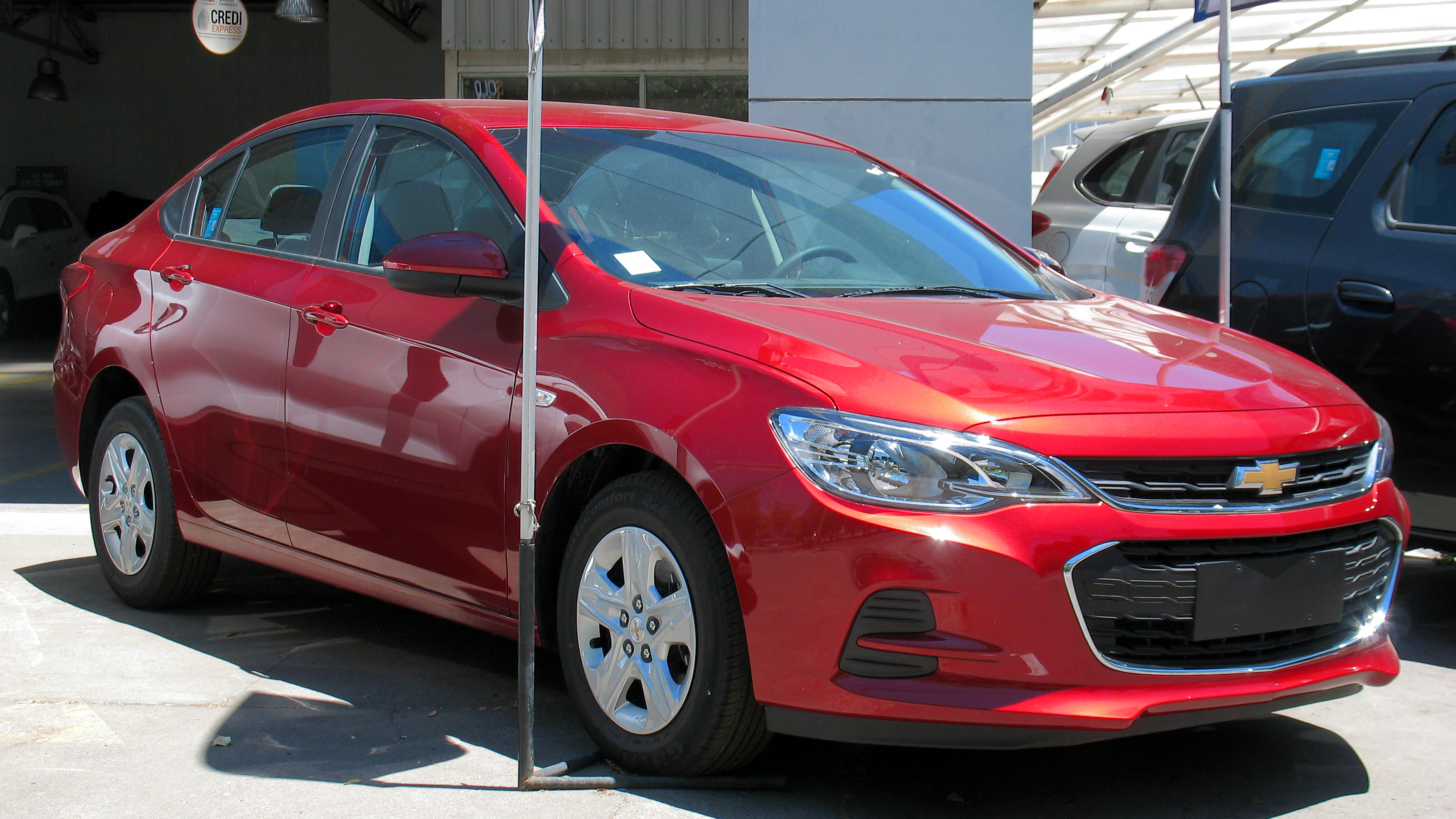 Chevrolet Cruze made in China